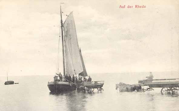 Passagiere werden mit einem Pferdewagen von einem Schiff an den Strand von Spikeroog gebracht.